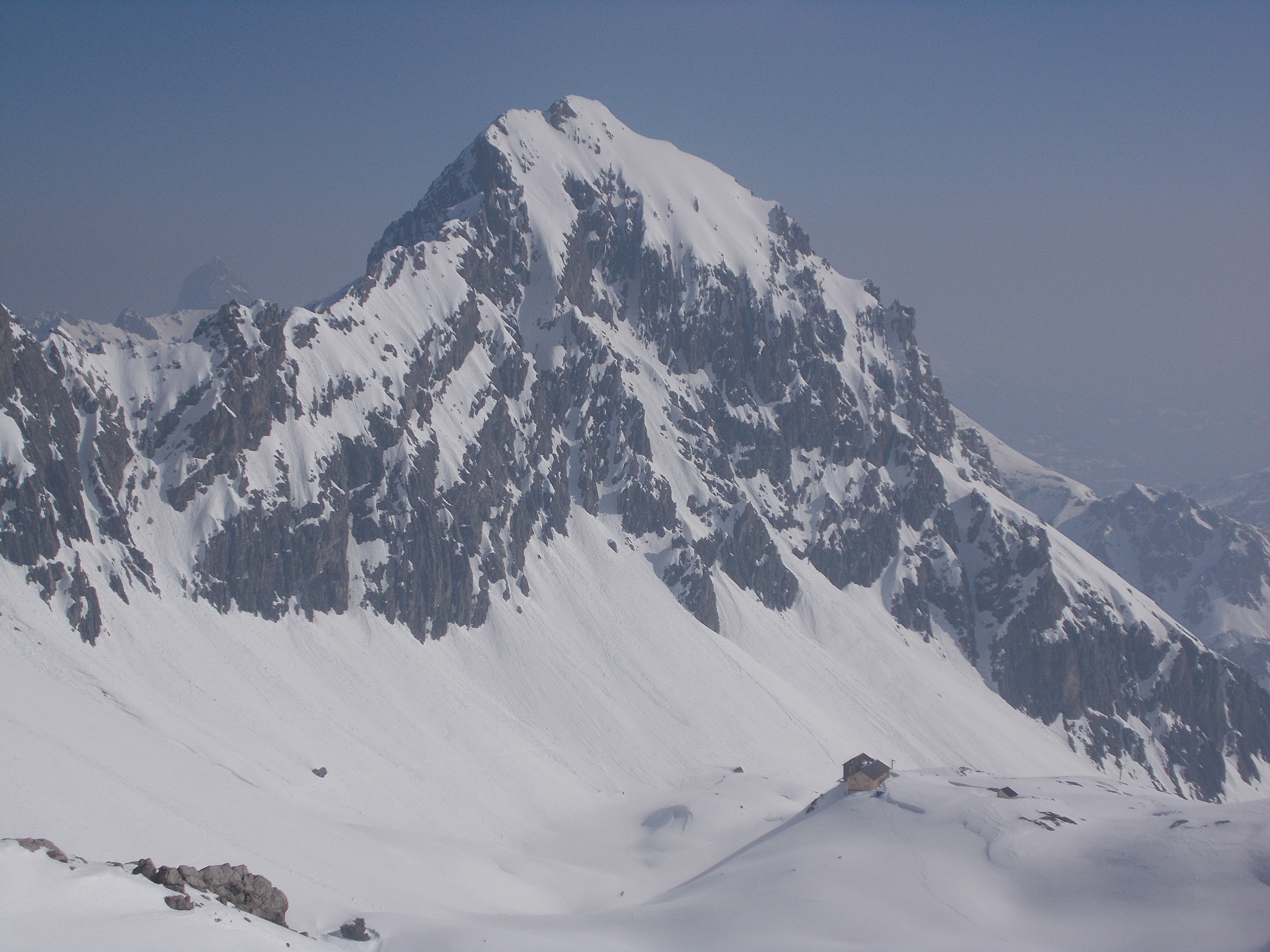 Das Haus im März 2015 vor der Kulisse des Seekopfes (2698 m). Die Lawine von 2019 kam von links.